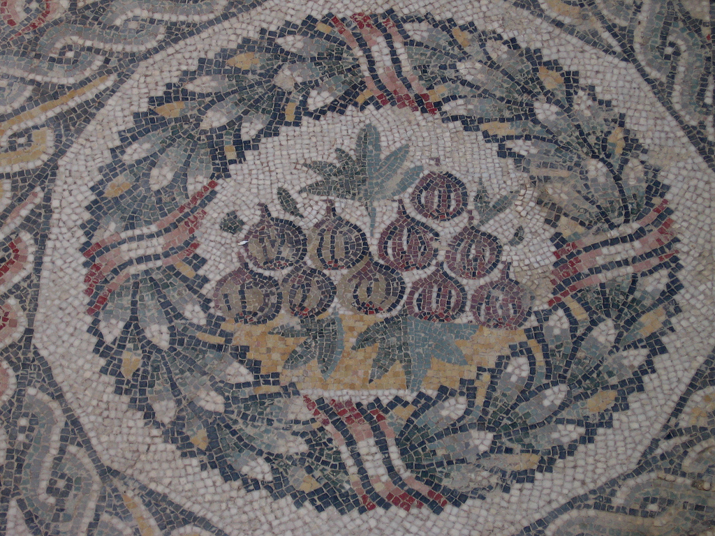 Villa Romana del Casale, Piazza Armerina, Sicily/Sicilia, Italy/Italien